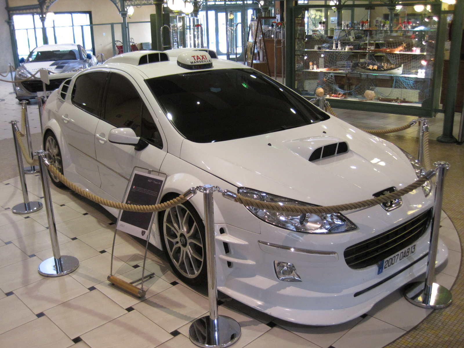 Peugeot 407 in Taxi 4 - Musée de l'Aventure Peugeot